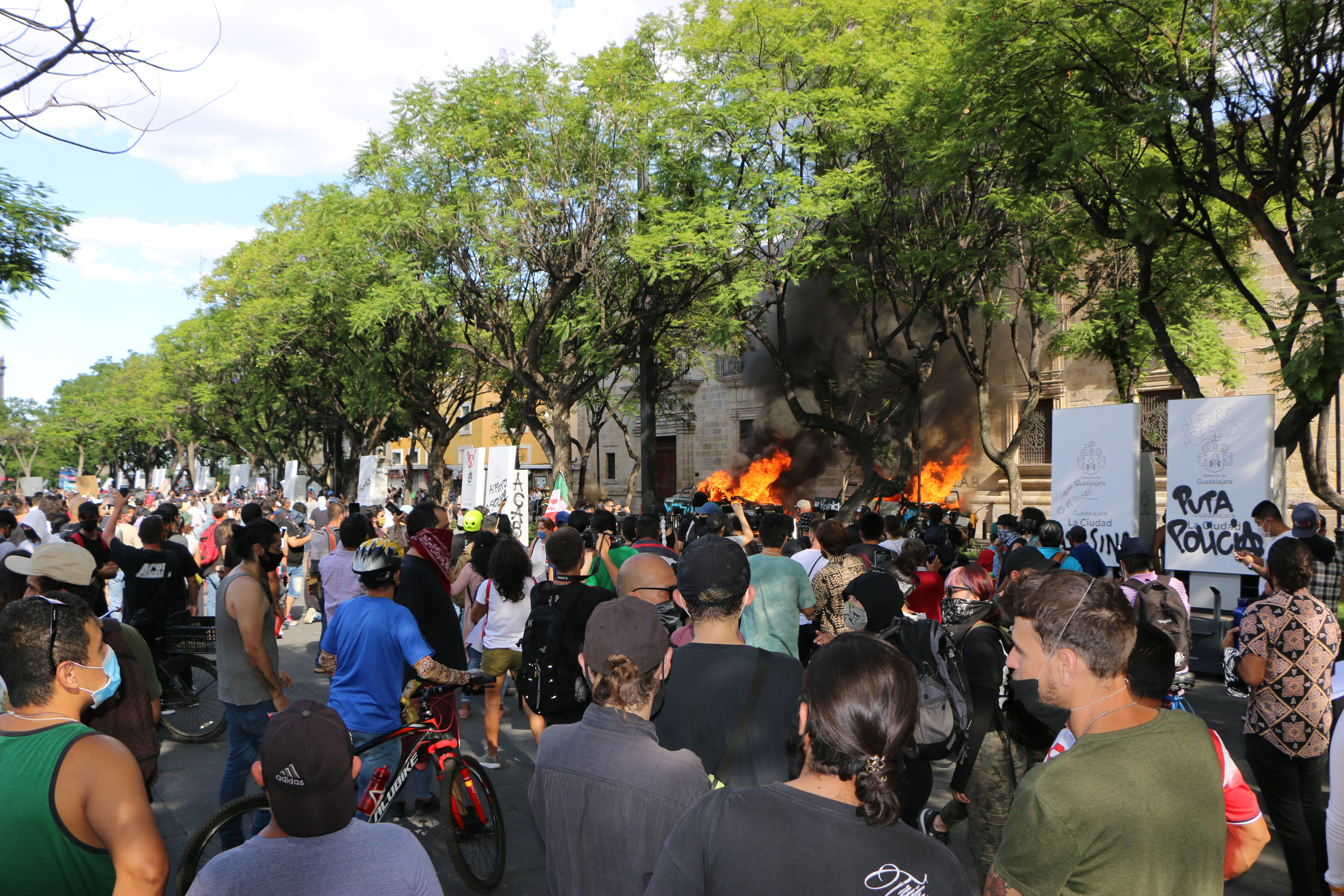 La muerte de Giovanni López Ramírez ocurrió el 4 de mayo de 2020 en el municipio de Ixtlahuacán de los Membrillos, Jalisco (México), como resultado de su arresto a manos de alrededor de diez policías municipales​ en el contexto de la pandemia por coronavirus en México. Tras un mes del suceso, se generó una ola de indignación pública luego de filtrarse un vídeo del evento e inspirado en el asesinato y protestas por la muerte de George Floyd en los Estados Unidos.1​ Las protestas comenzaron en Jalisco el 4 de junio en contra de la brutalidad policial, las protestas se expandieron a otras partes de México. El 11 de junio de 2020 la Comisión Estatal de Derechos Humanos de Jalisco publicó un informe del caso, determinando que se trató de una ejecución extrajudicial por parte de la policía municipal, en donde se acreditó la violación a los Derechos Humanos de la seguridad jurídica, a la presunción de inocencia y a la libertad individual.